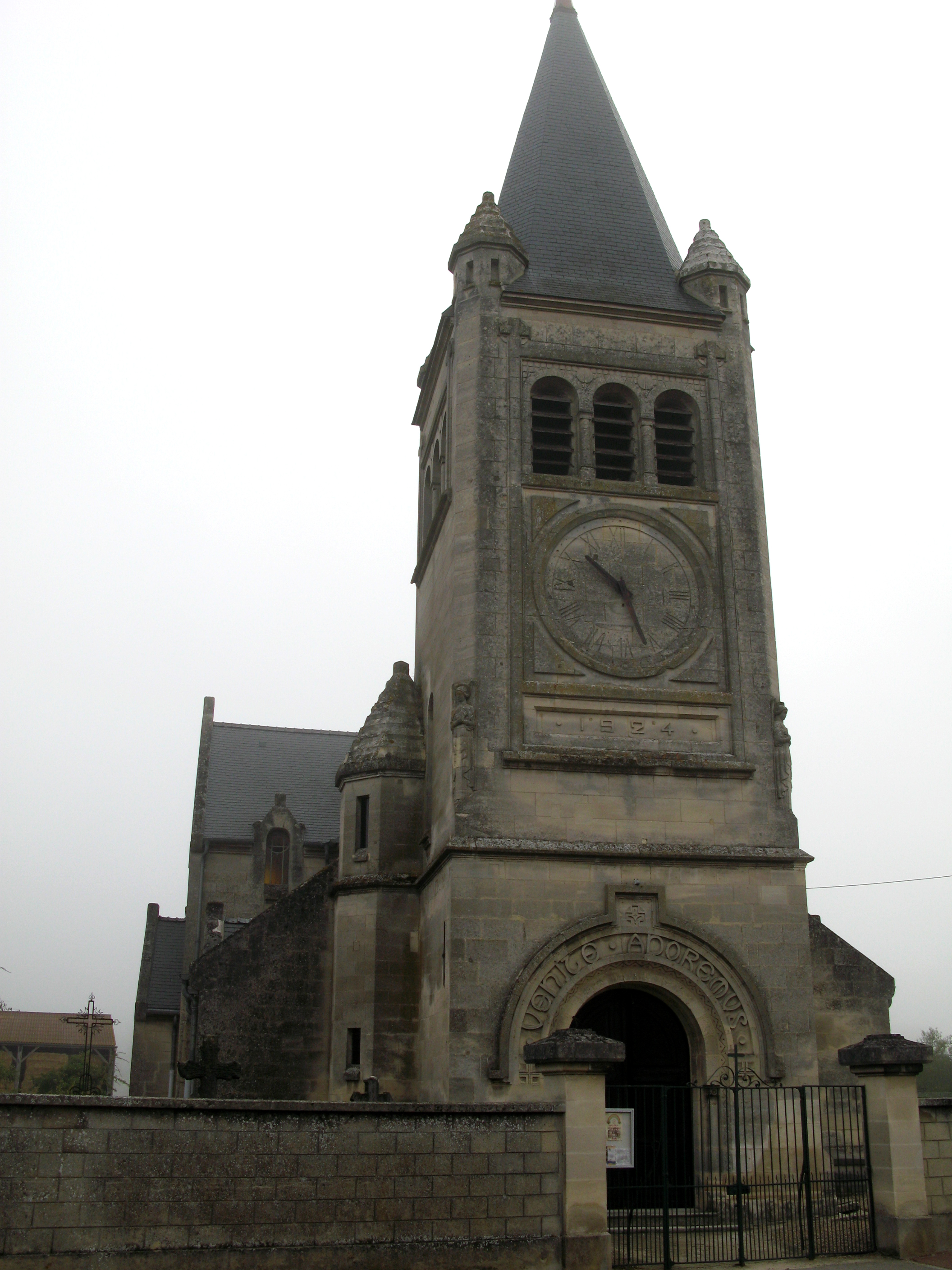 Pontoise-lès-Noyon (Oise, France) - L'église, par temps de légère brume. . .